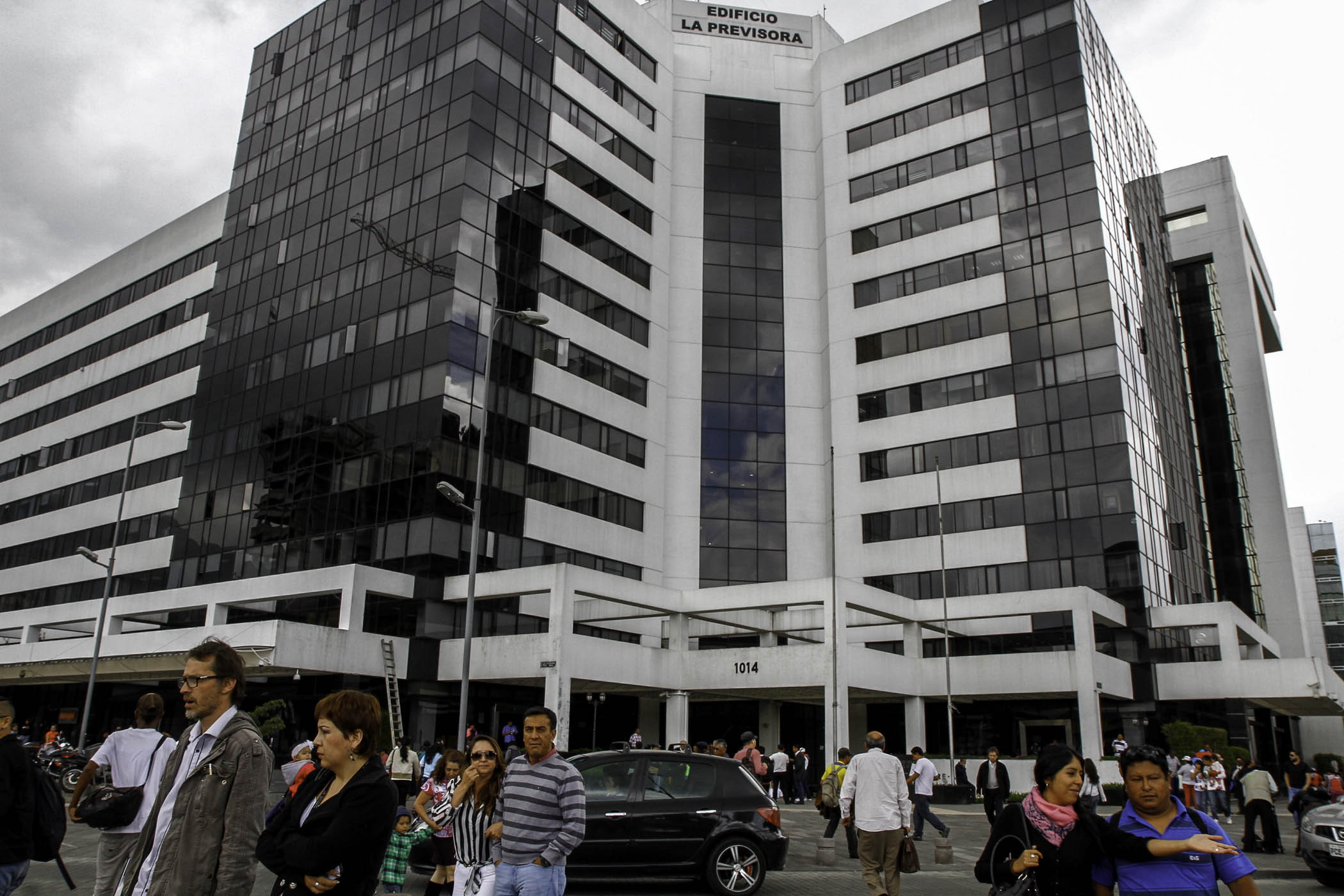 Quito, 04 mar (ANDES).- Fachada del Registro Civil ubicado en la Ave. de las NNUU Y Amazonas. Foto: Micaela Ayala V./ANDES